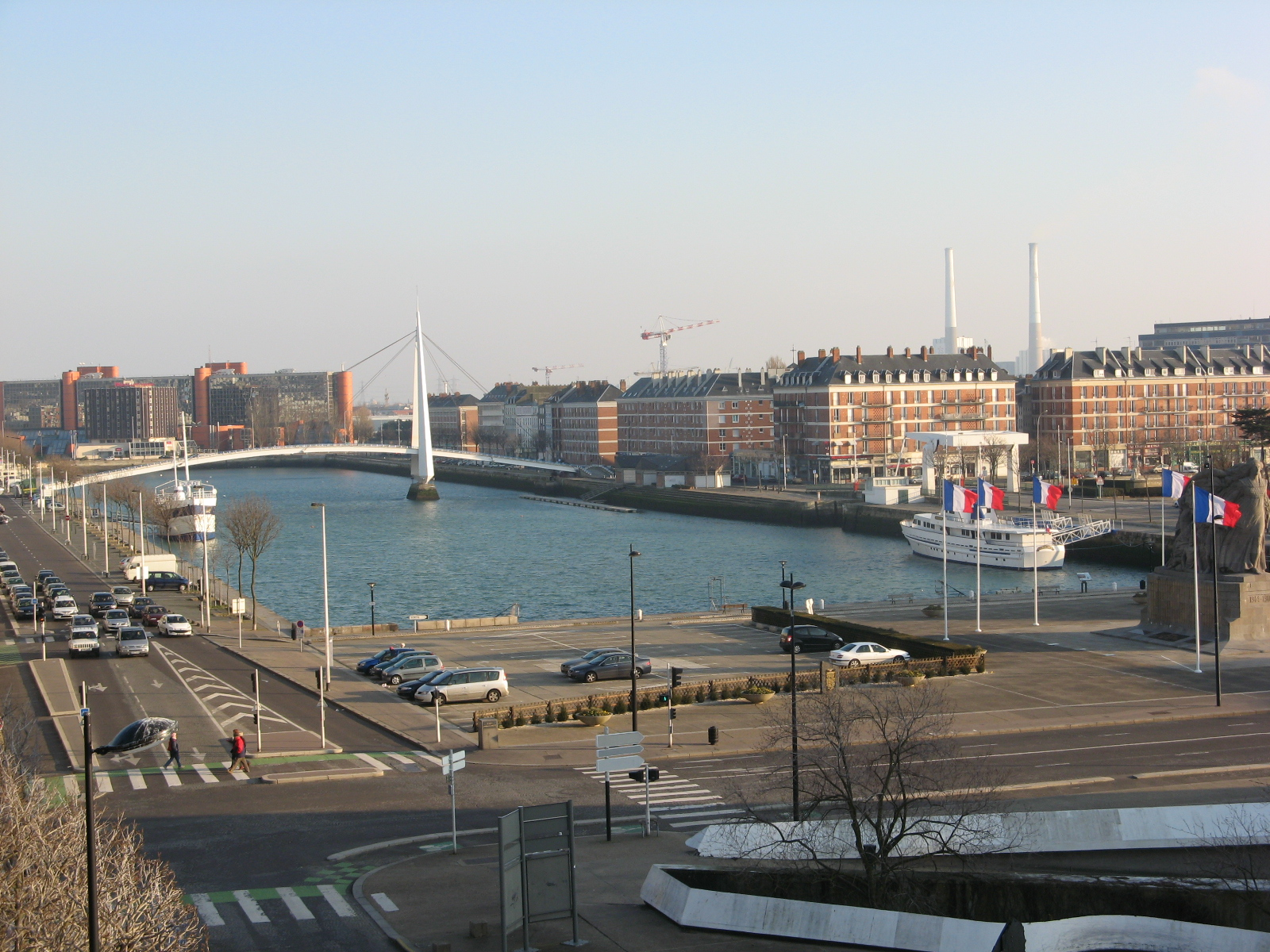 Bassin du Commerce au Havre, devant la place du Général de Gaulle (parking à gauche et monument aux morts tout à droite